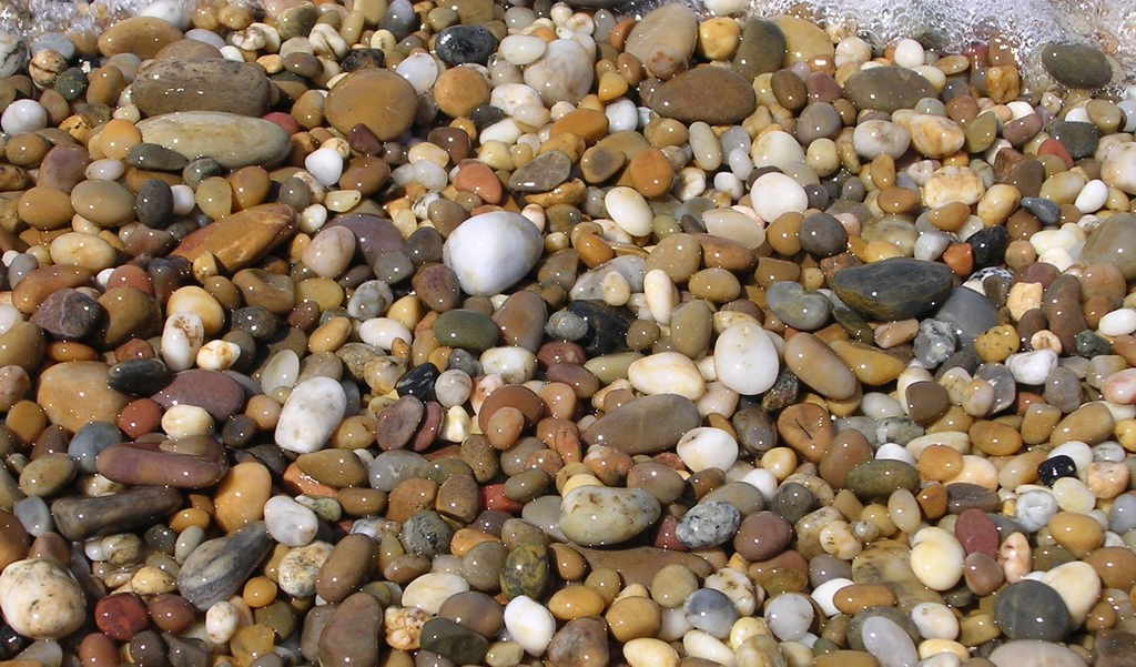 Pebbles